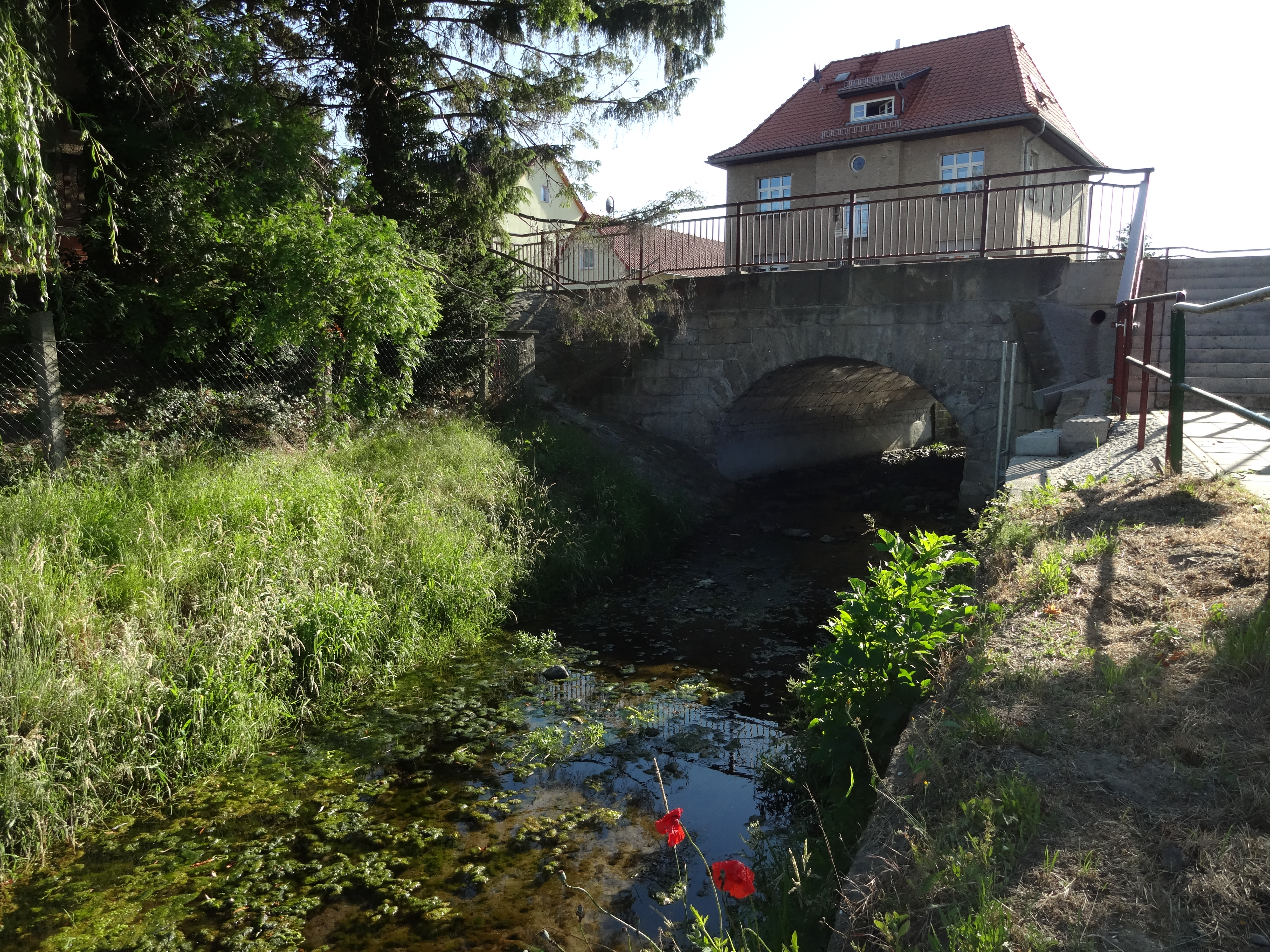 denkmalgeschützte Brücke über den Goldbach in Harsleben